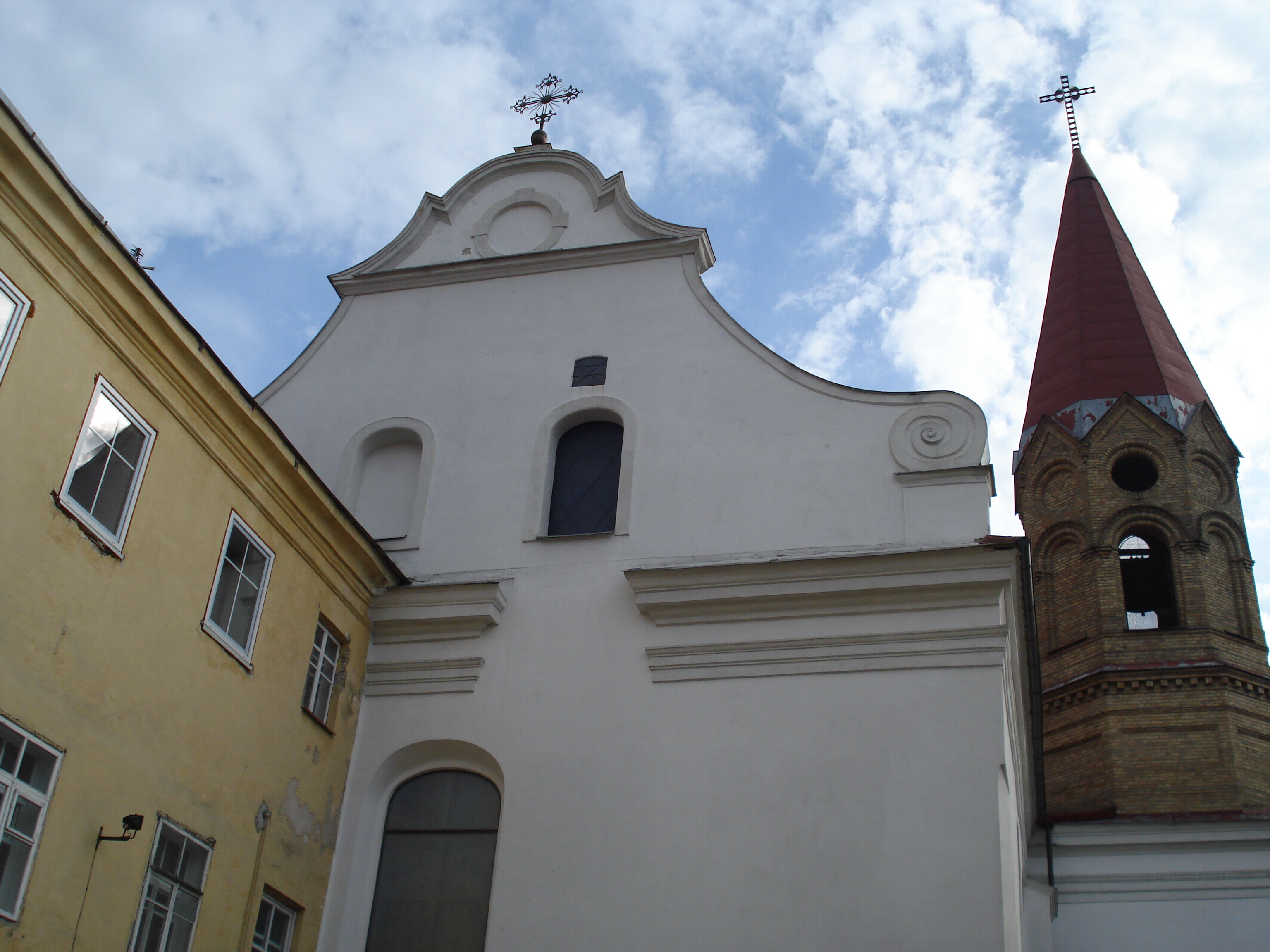 Evangelical Lutheran Church in Vilnius. Vokiečių g. 20